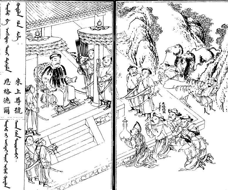 选自满洲实录